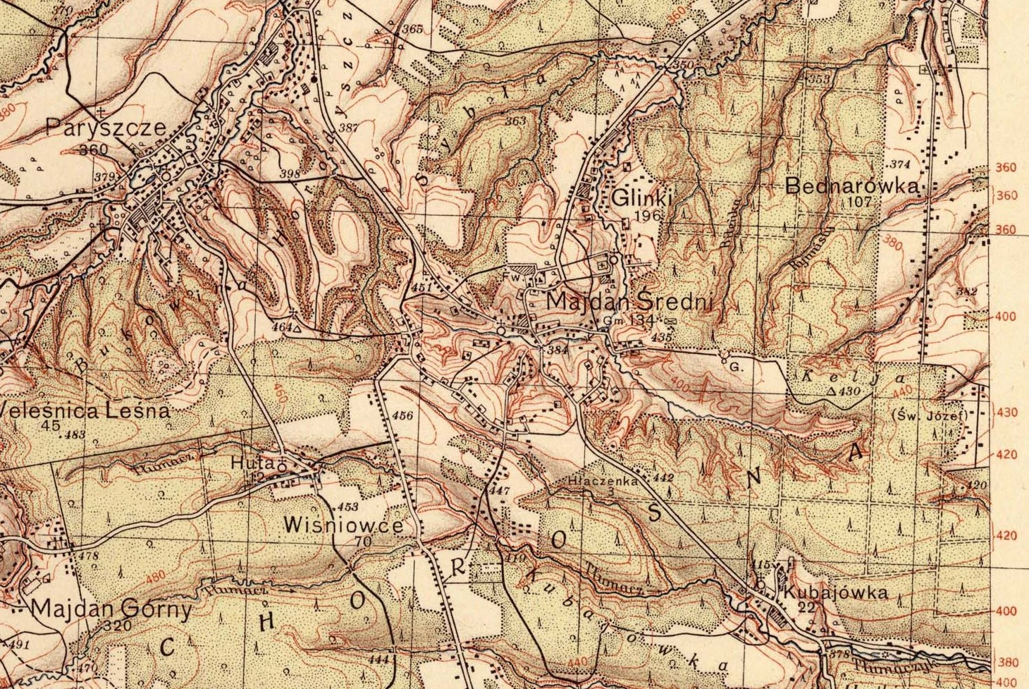 Фрагмент польської тактичної карти 1929 року, с. Середній Майдан